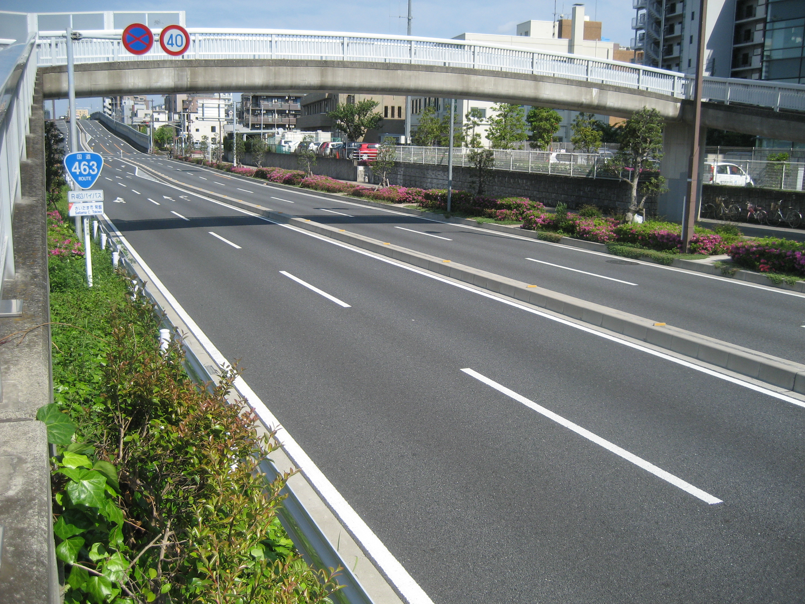 国道463号線浦和越谷バイパスさいたま市浦和区常盤付近（越谷方面を撮影）